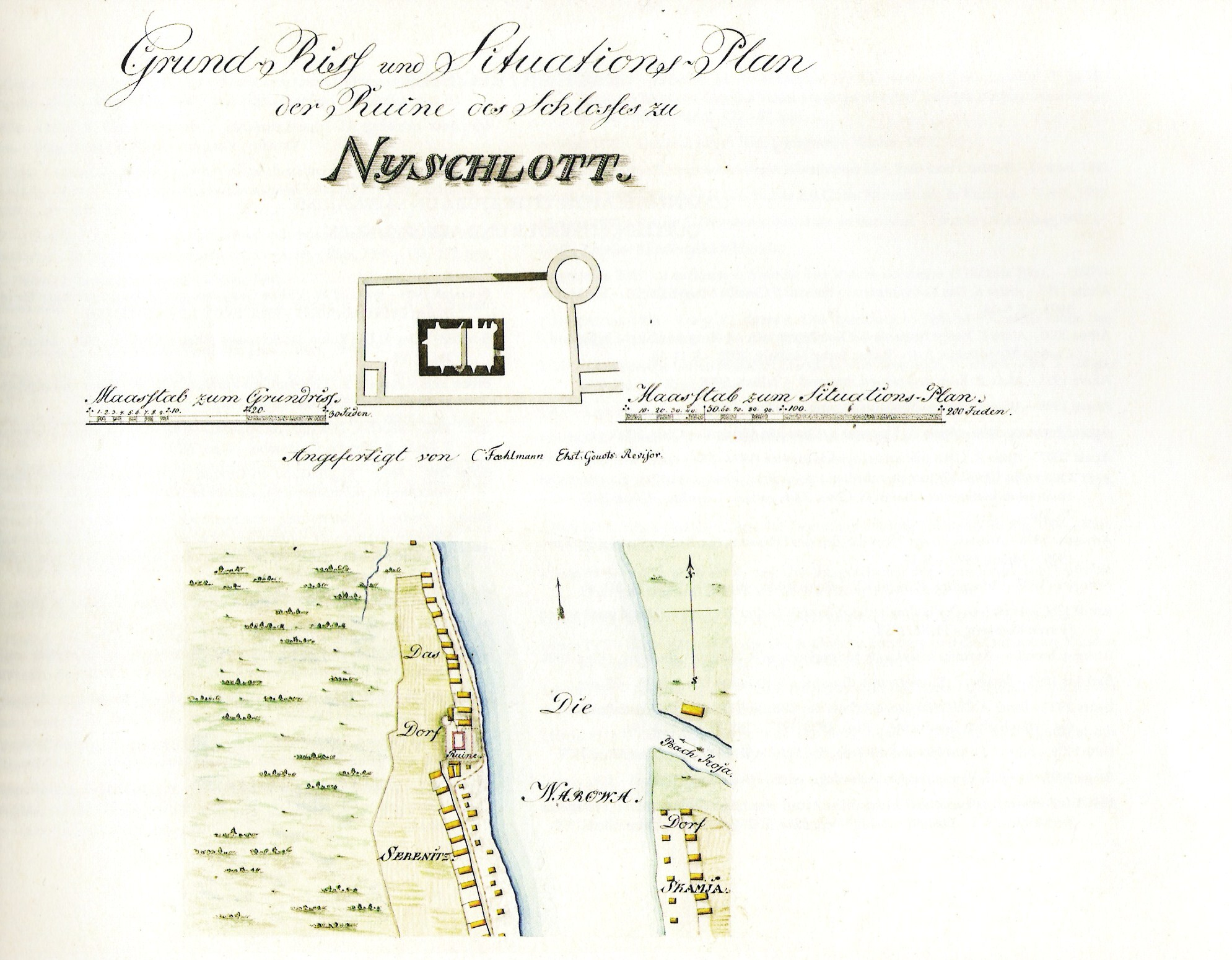 Vasknarva linnuse asendiplaan.